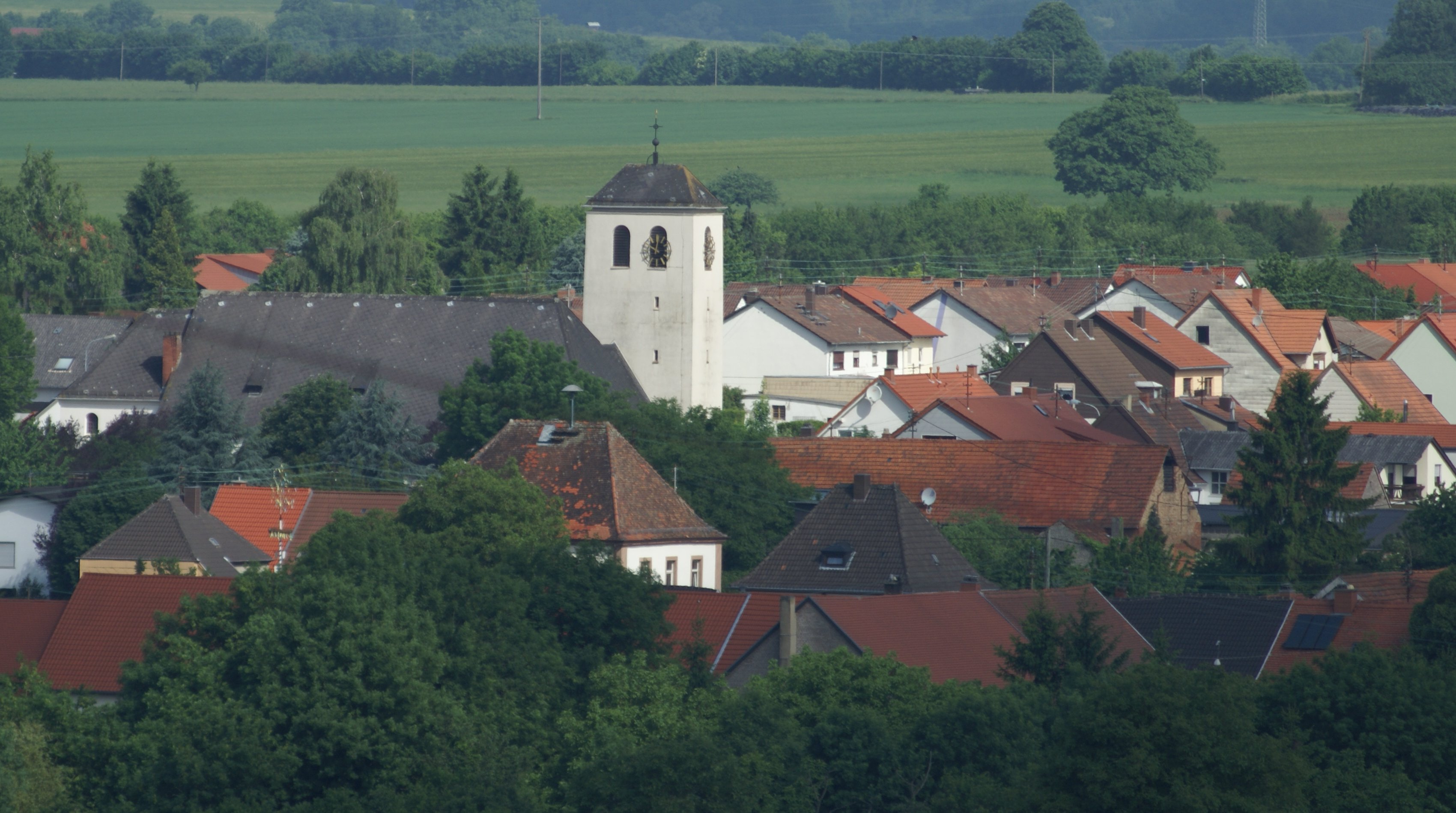 Ortsansicht Aßweiler